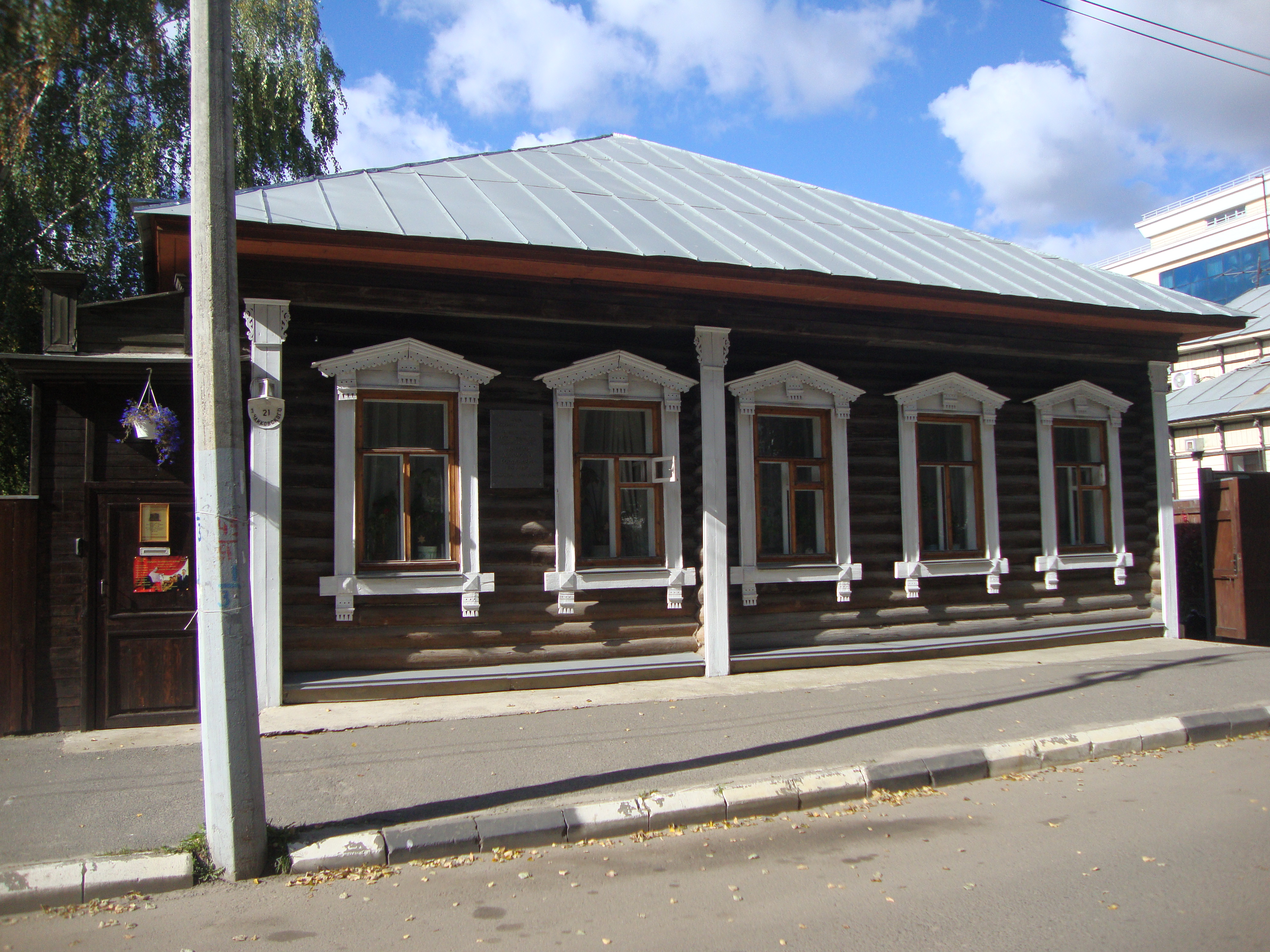 Дом, в котором в 1912-1914 гг. жил М. А. Богданович, ул. Чайковского, 21, Ярославль